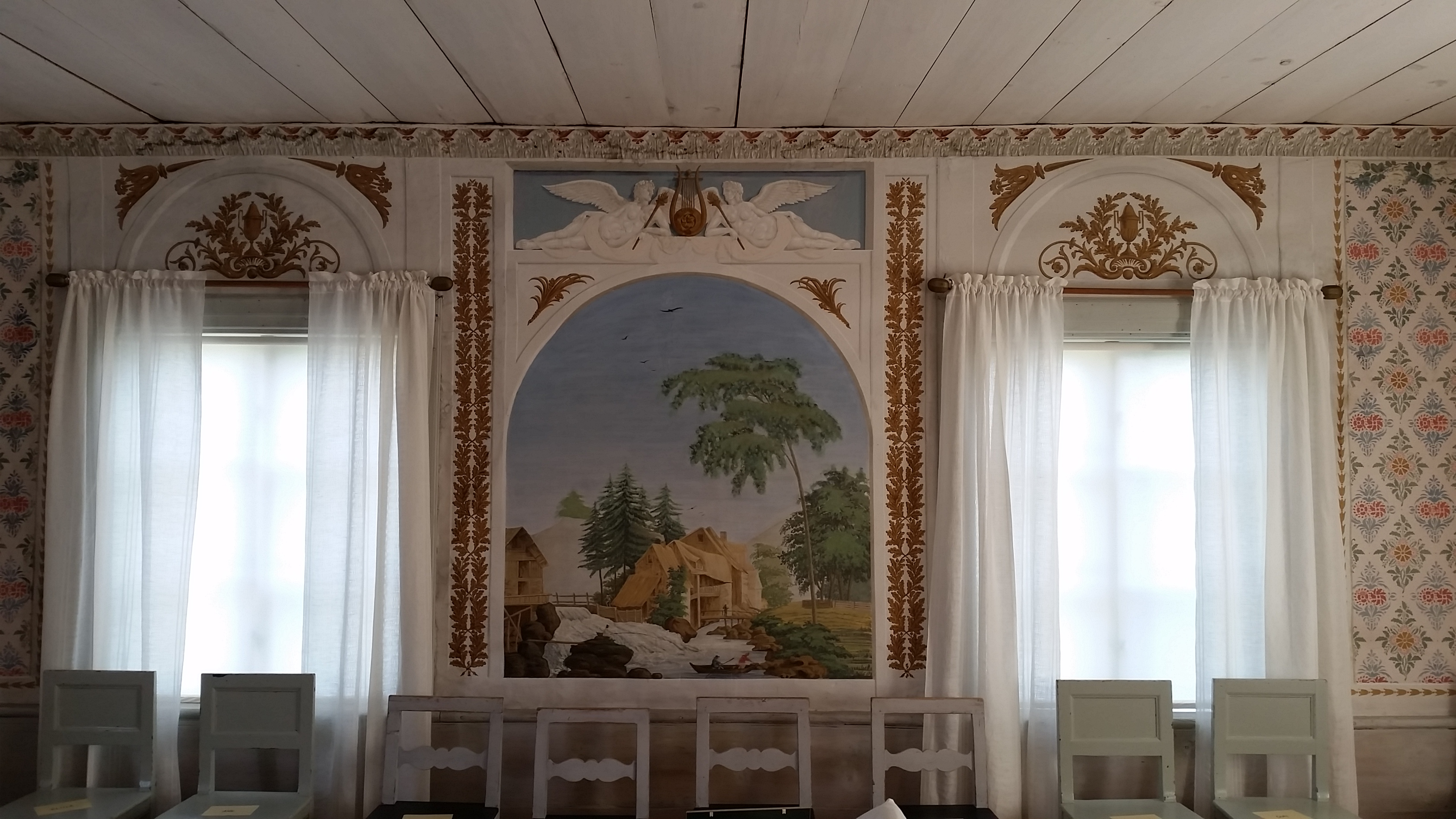 Väggmålning från Hälsingegården Gästgivars målad av Jonas Wallström (1798-1862).